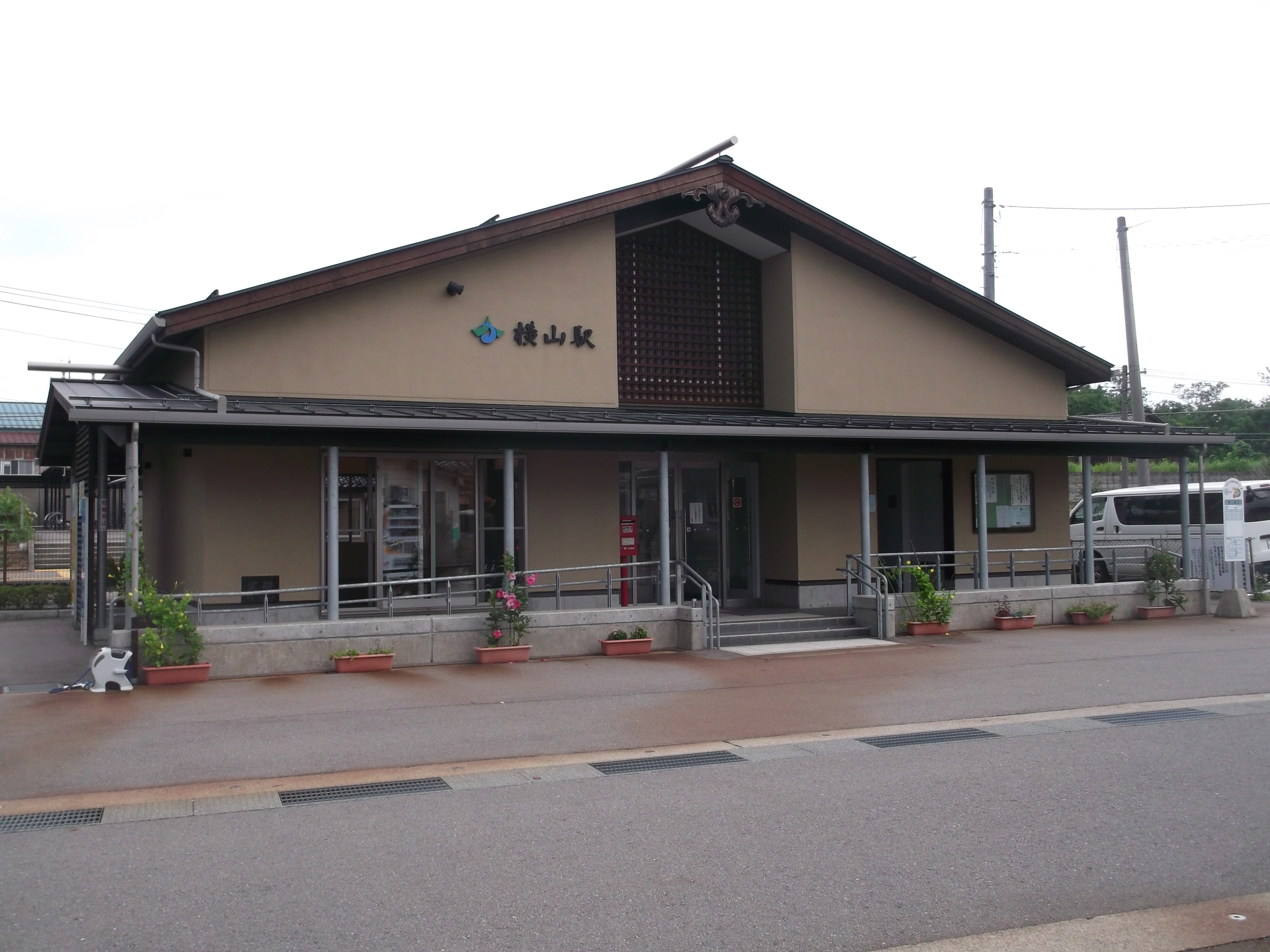 JR七尾線 横山駅駅舎